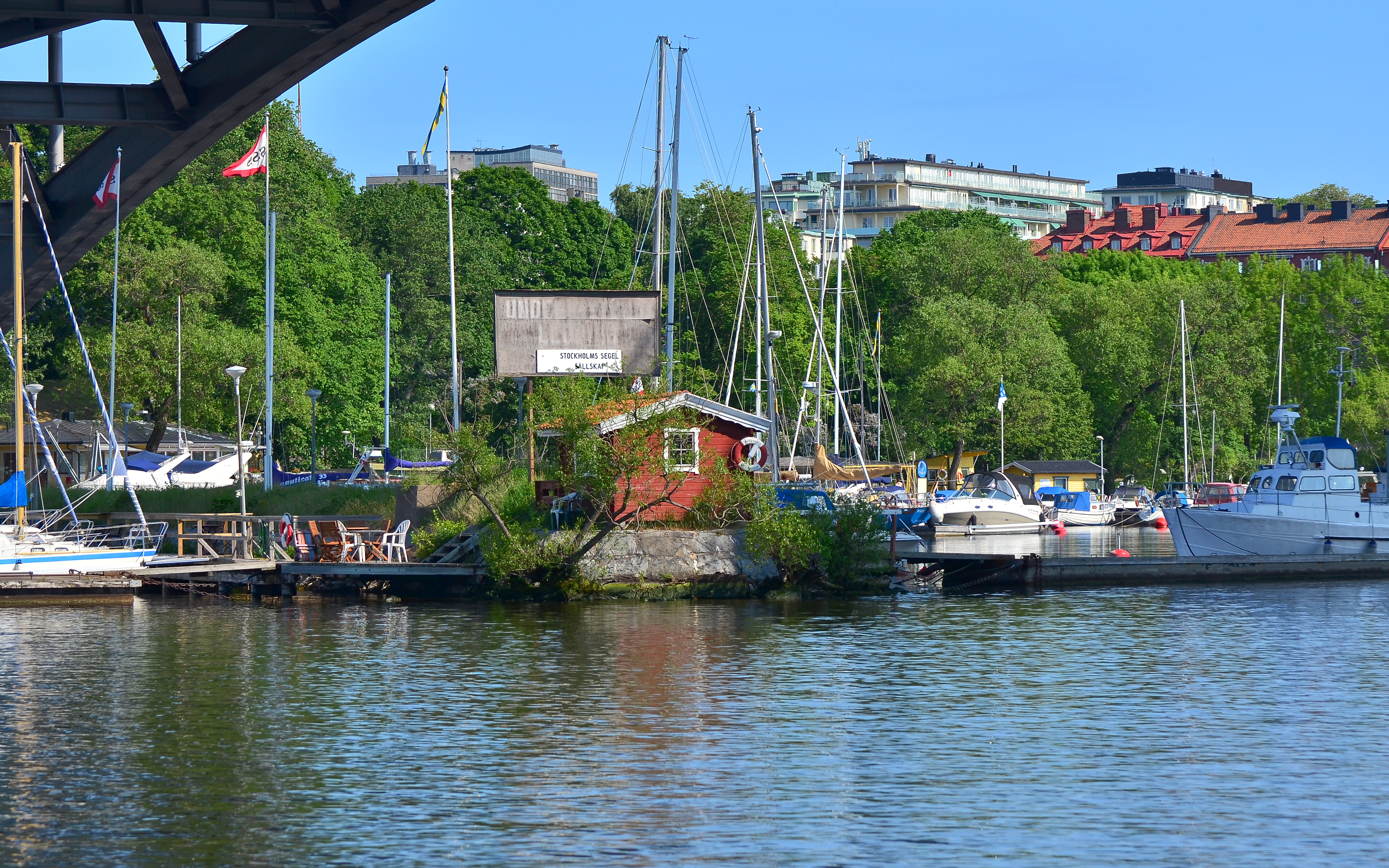 Västerbrohamnen under Västerbron, Stockholm.